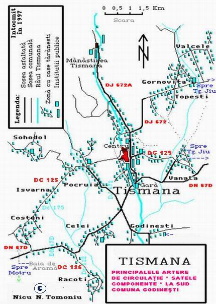 Harta cu principalele artere de circulatie din orasul Tismana